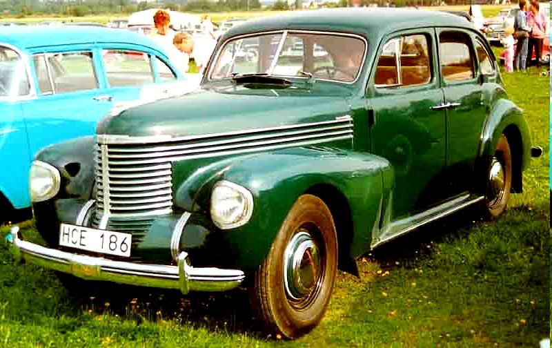 Opel Kapitän De Luxe 4-Door Limousine 1939